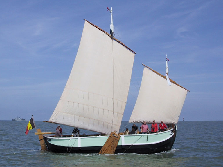 Le voilier Sint Pieter B1, scute de Blankenberge, réplique d'un bateau de pêche flamand traditionnel